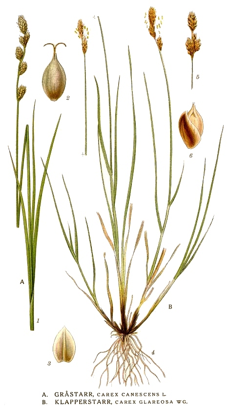 A. Carex canescens L., B. Carex glareosa Wahlenb. Original Description A. Gråstarr, Carex canescens L. B. Klapperstarr, Carex glareosa Wg.